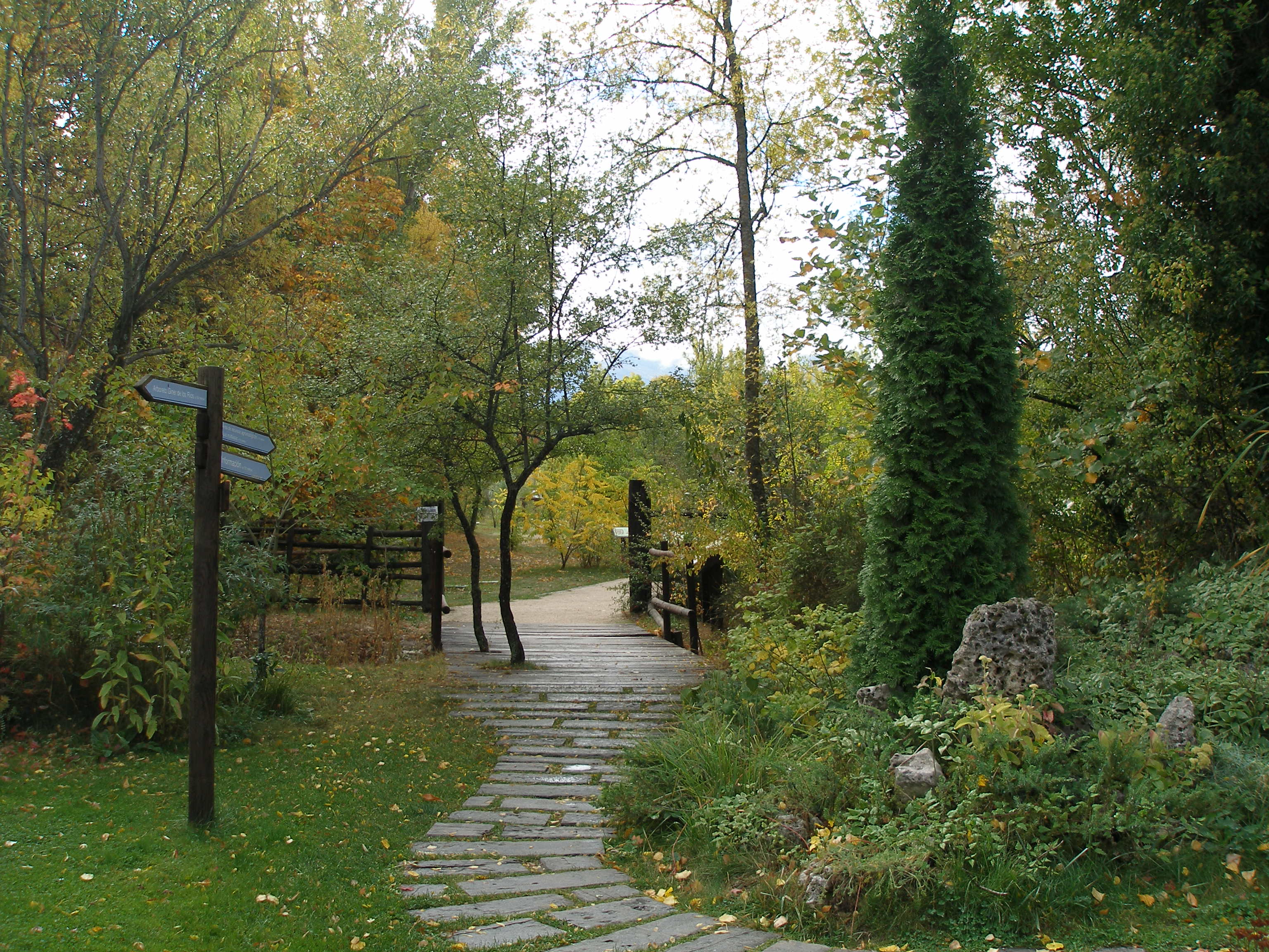 Entrada al CV Puente del Perdón